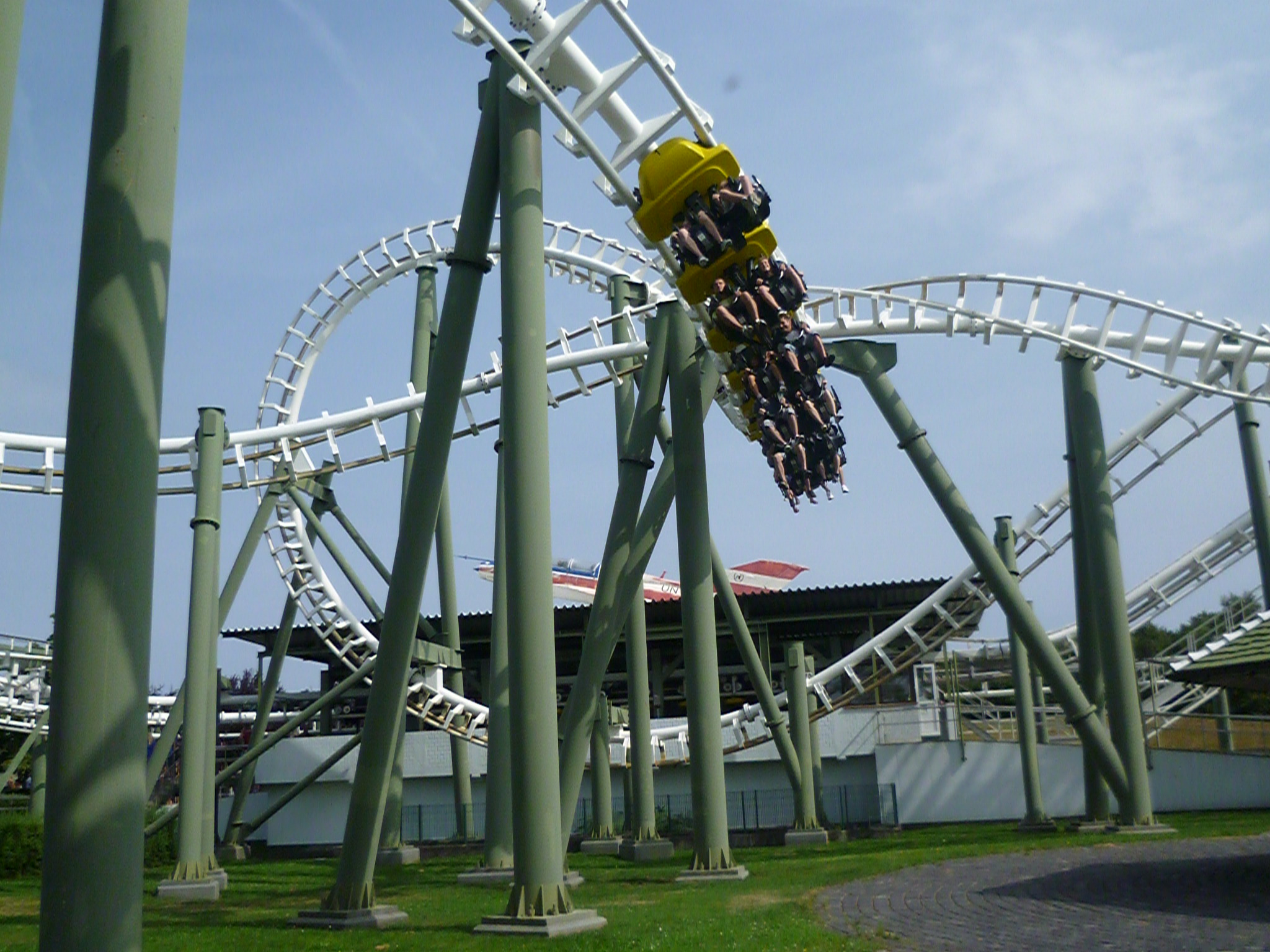 Ausfahrt eines zuges aus dem Sidewinder.